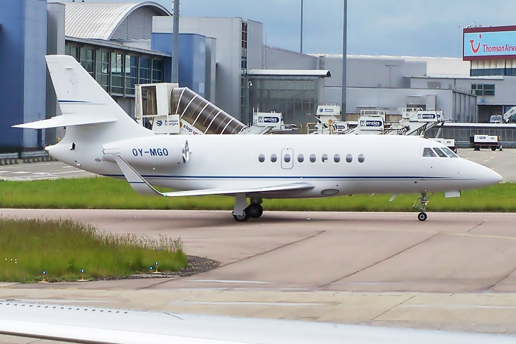 OY-MGO Dassault Falcon 2000EX